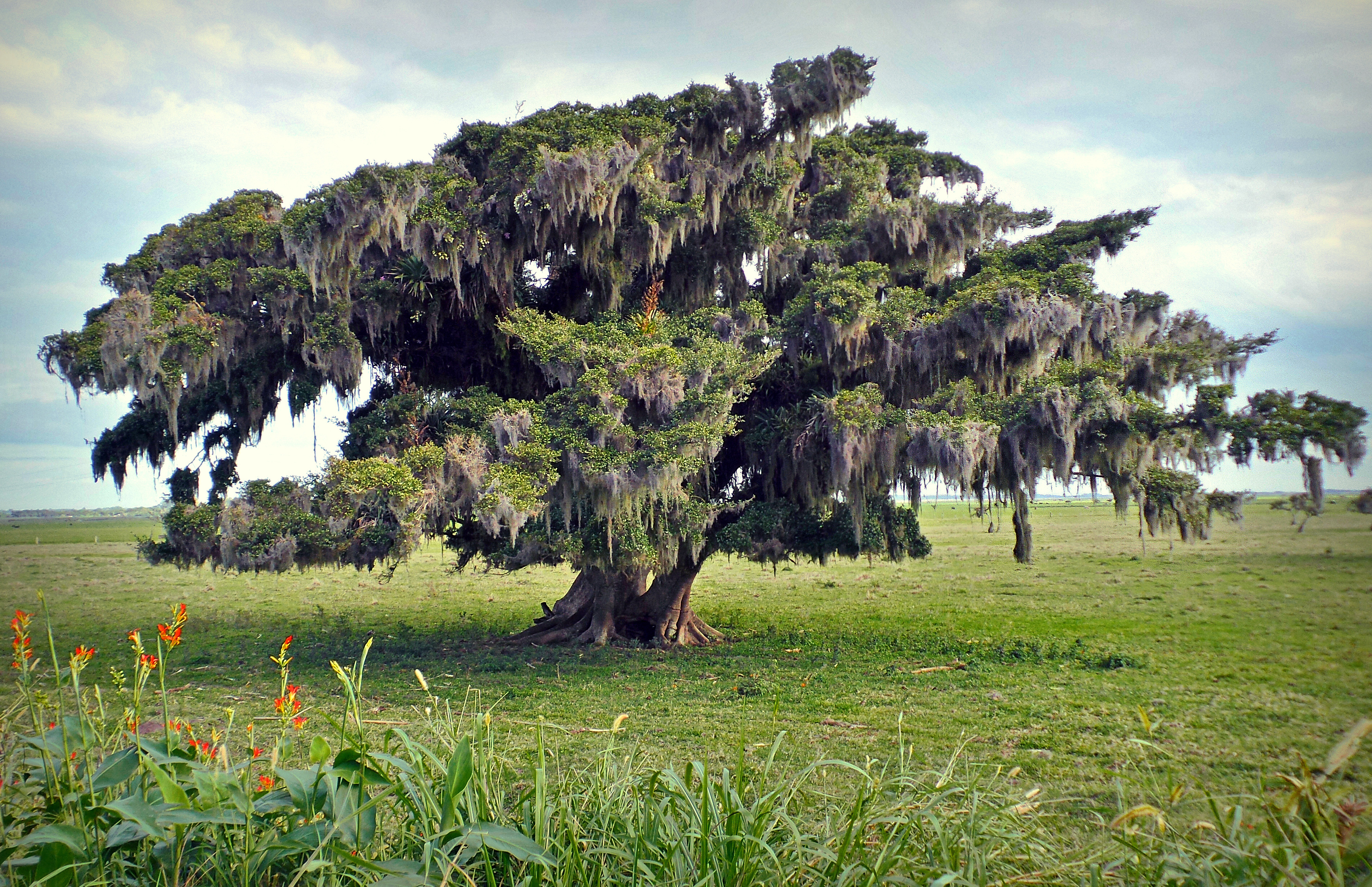 O Parque Estadual de Itapeva é uma das Unidades de Conservação do Governo do Estado do Rio Grande do Sul, Brasil. A Lagoa Itapeva é uma lagoa localizada no litoral norte do estado do Rio Grande do Sul, no Brasil.